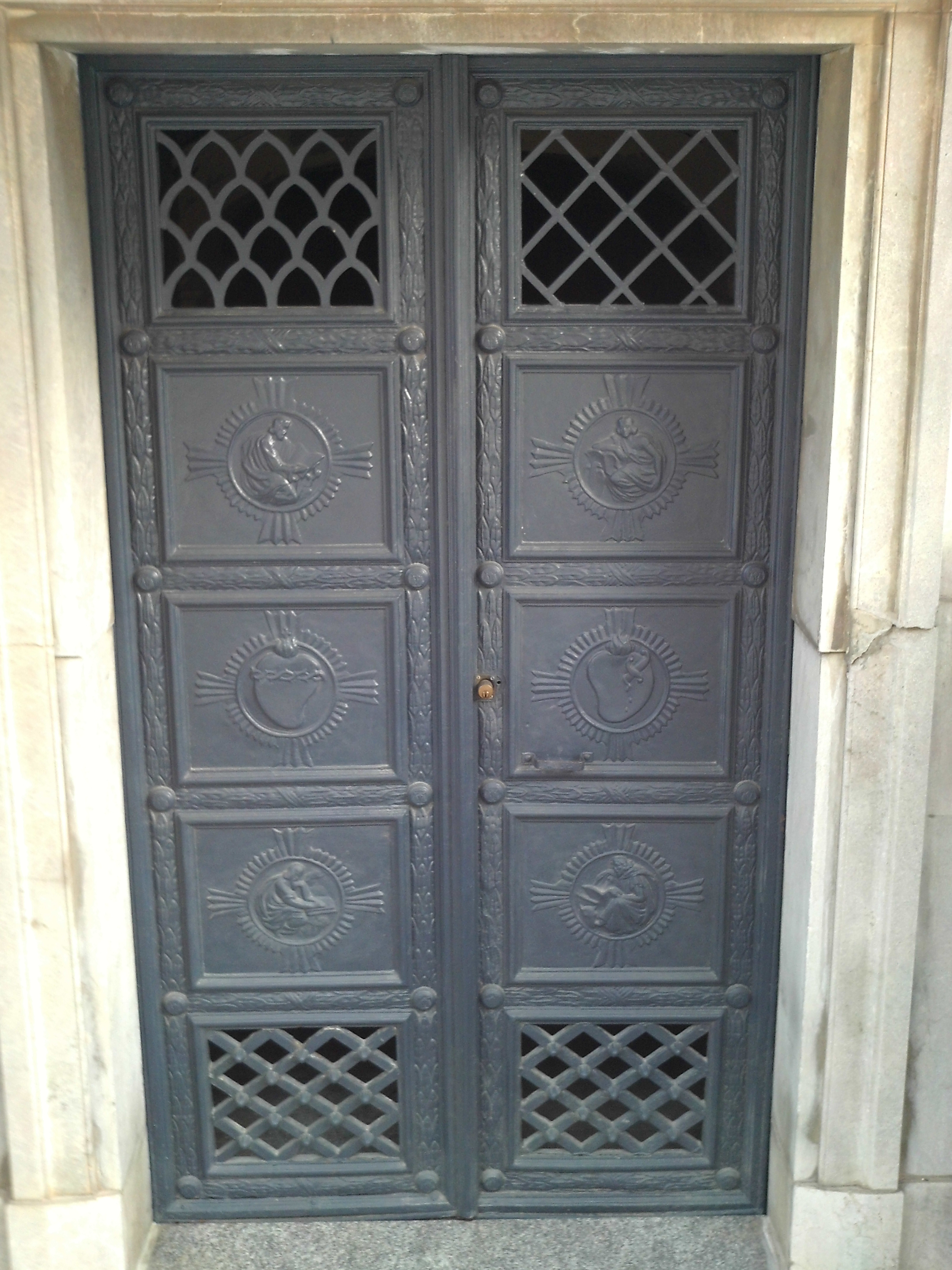 Puerta de la cripta, en el interior del complejo de los Sagrados Corazones